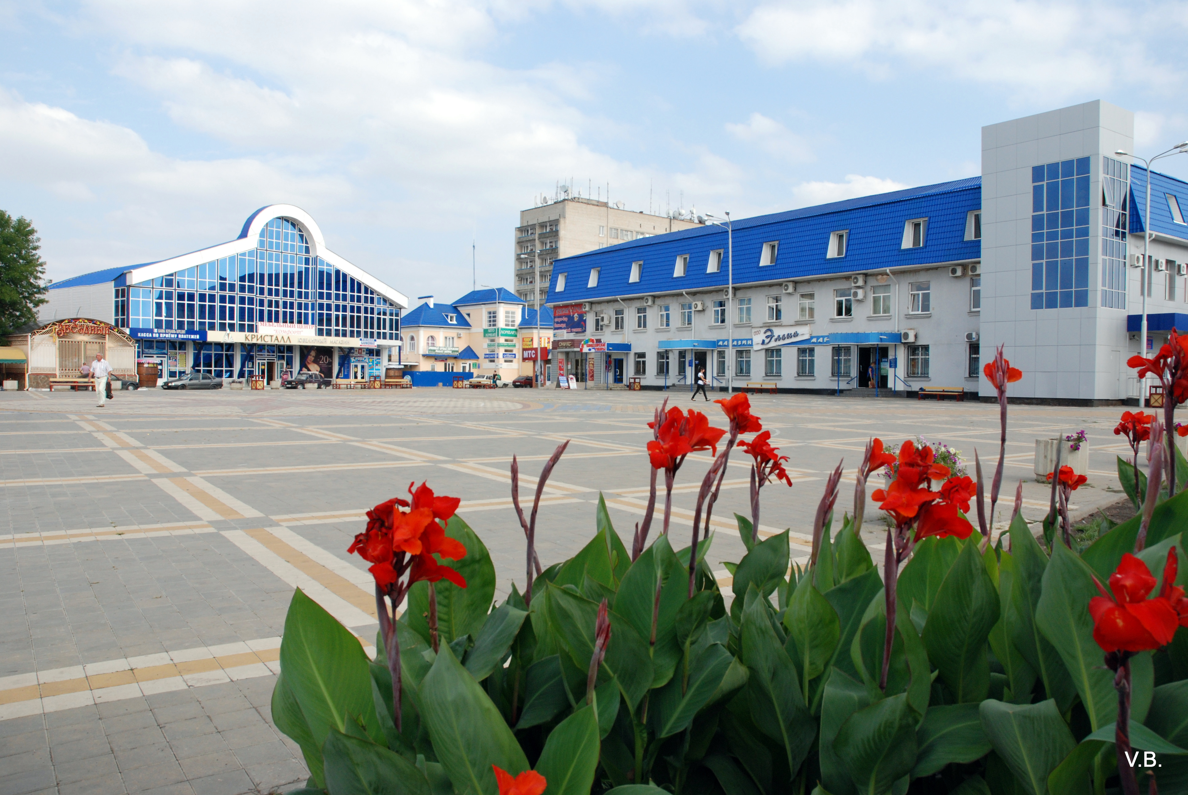 Центральная площадь. Фото Виктора Белоусова.